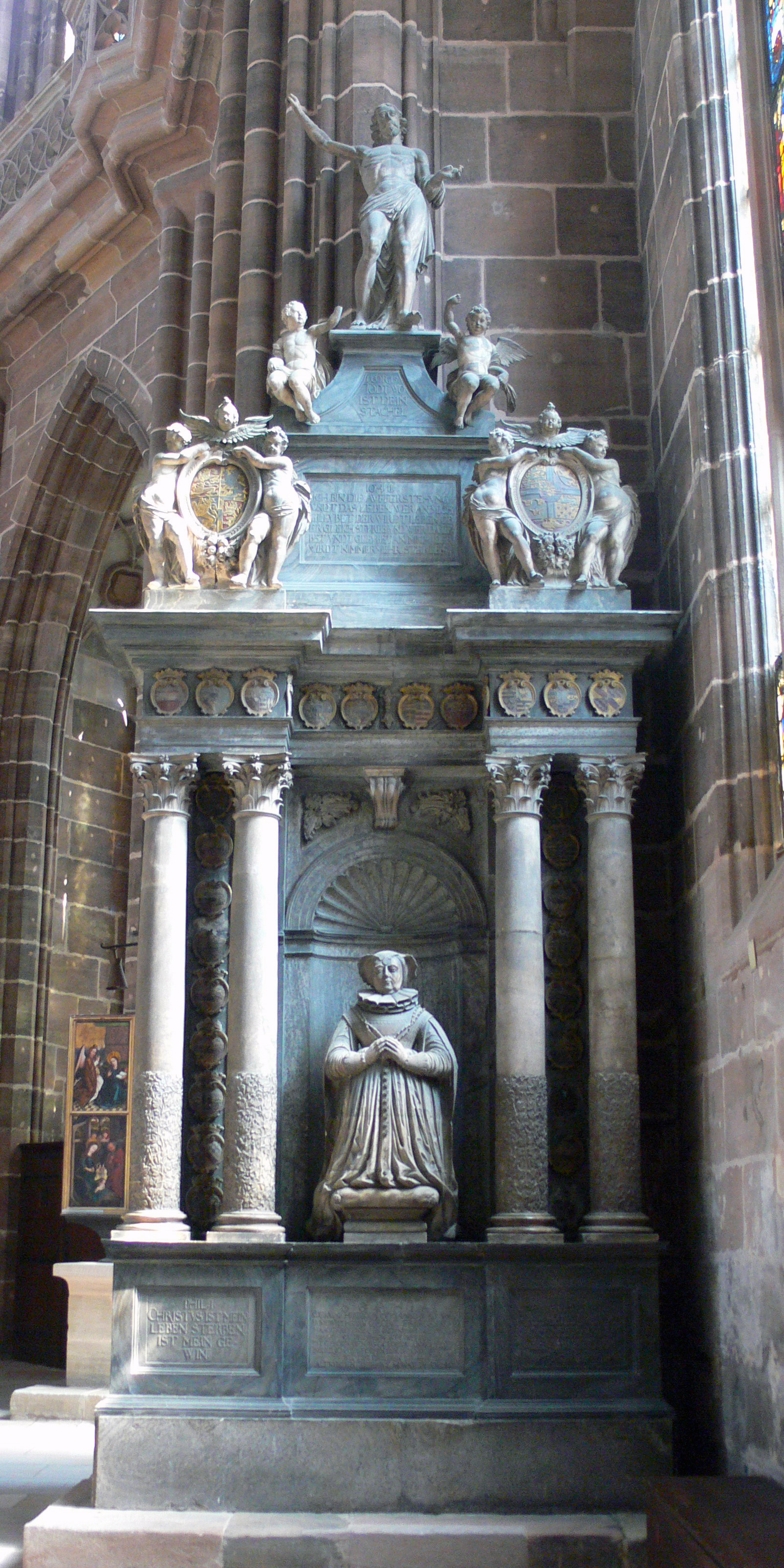 Nuremberg - St. Lorenz